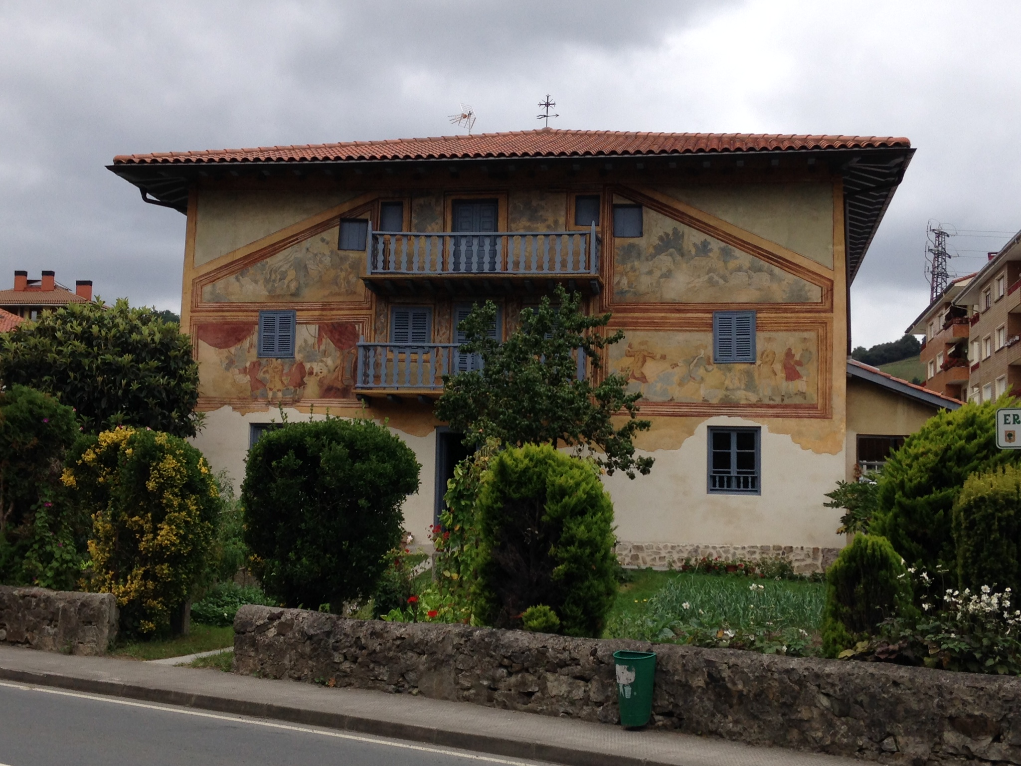 Caserío con la fachada pintada al fresco, En Berriatua, Vizcaya País Vasco (España)